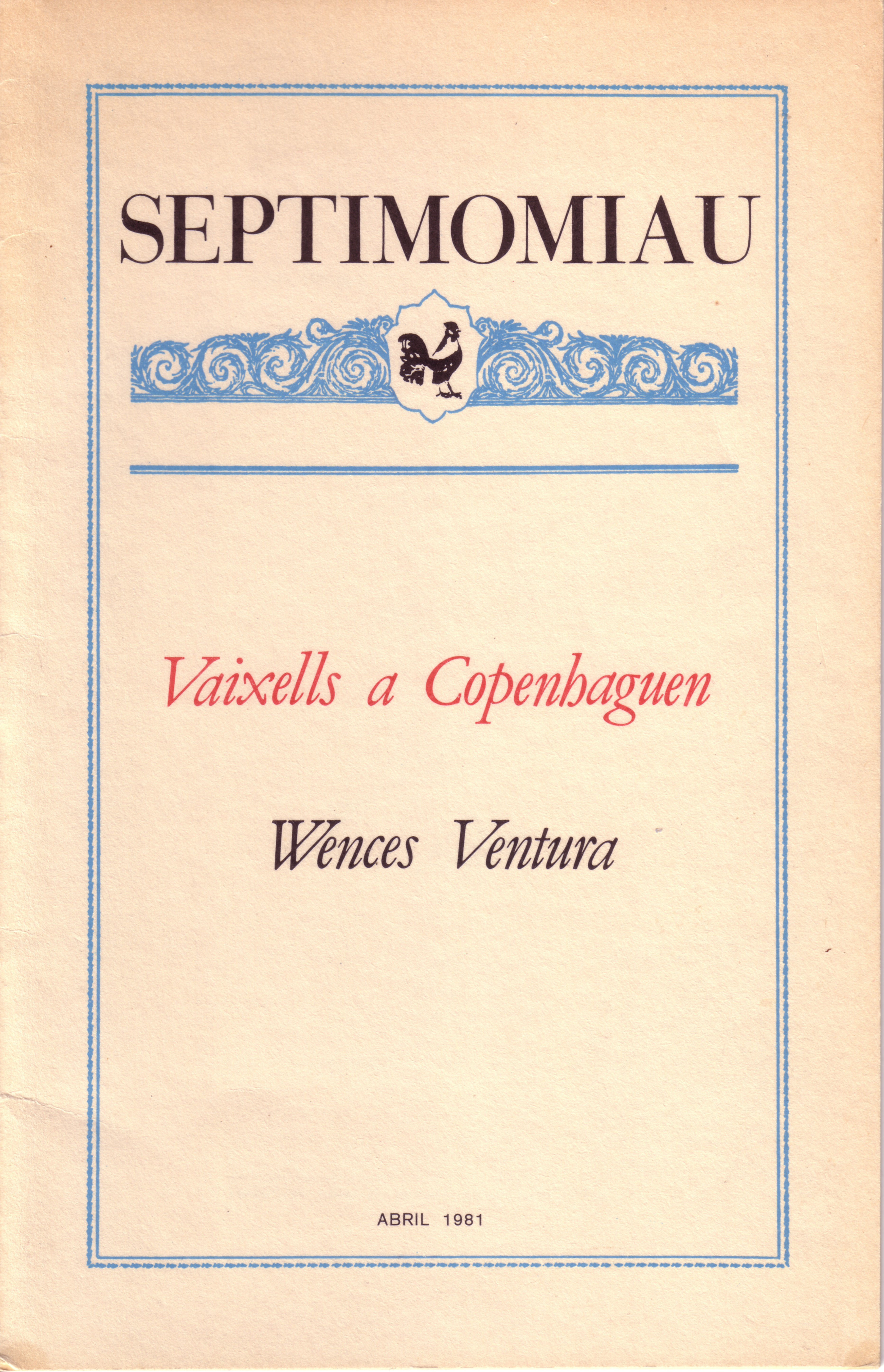 Portada de "Vaixells a Copenhagen" (1981), del poeta Wences Ventura